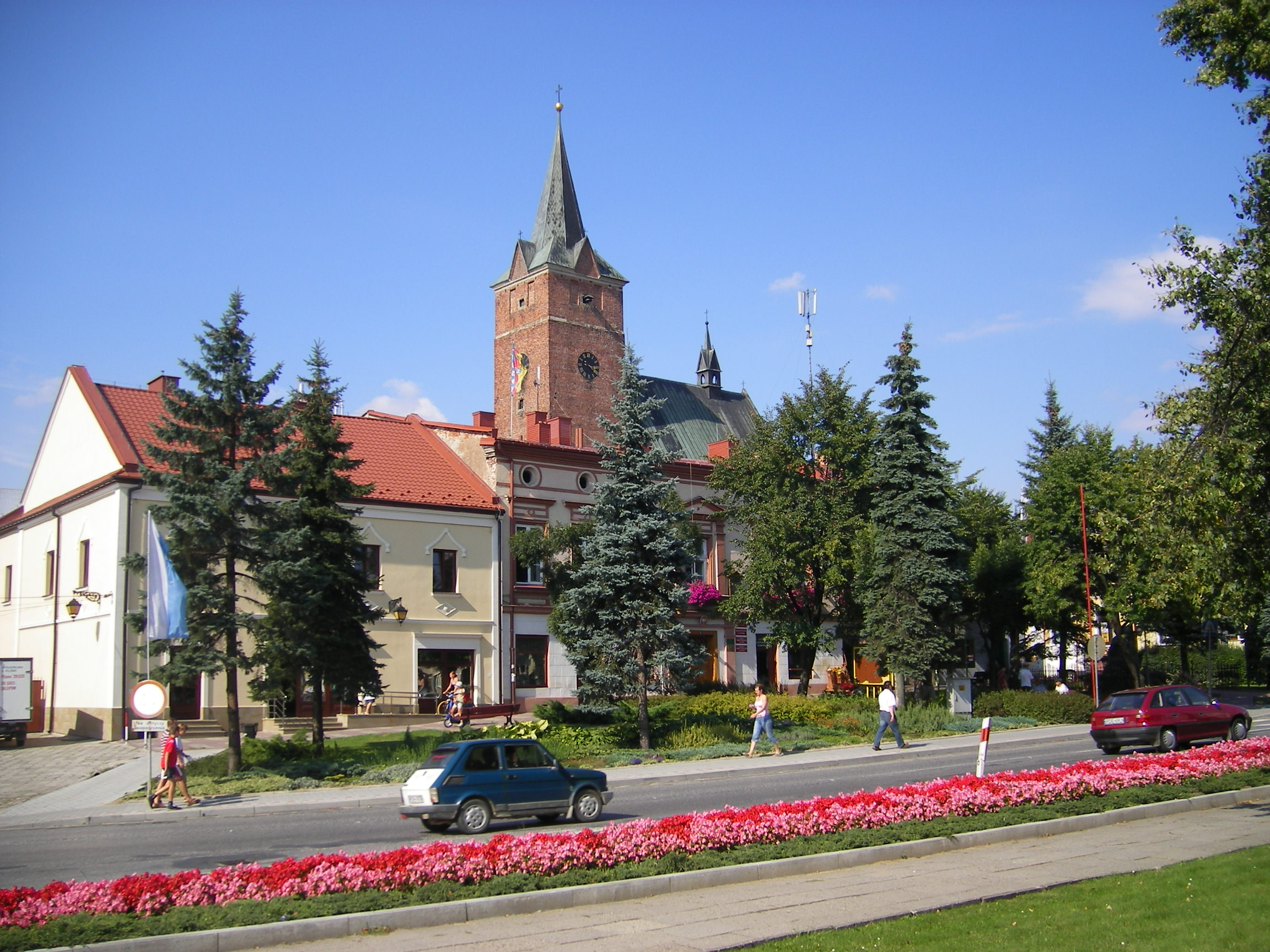 Pilzno, powiat Debica